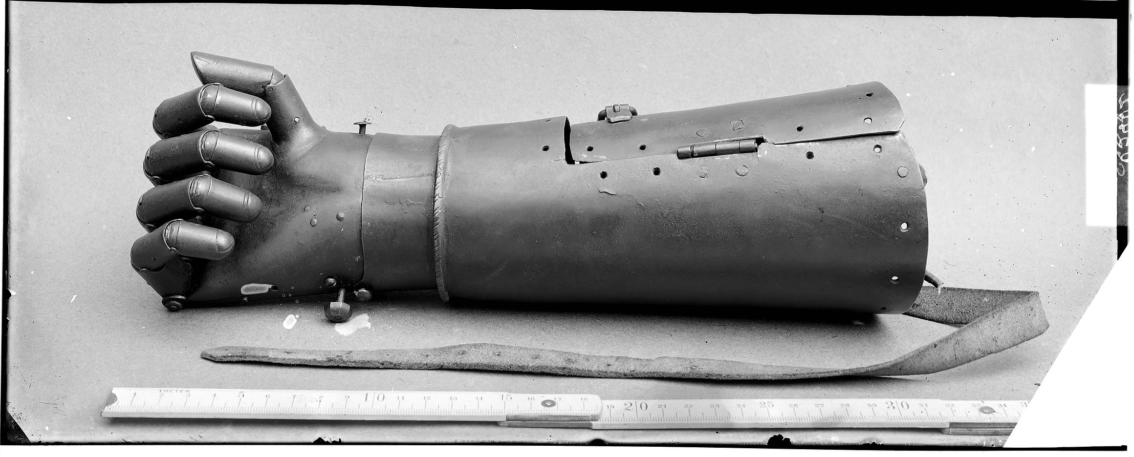 Jüngere Eiserne Hand des Ritters Götz von Berlichingen, um 1530, Museum der Burg Jagsthausen. Glasnegativ von Wilhelm Kratt (1887–1968).